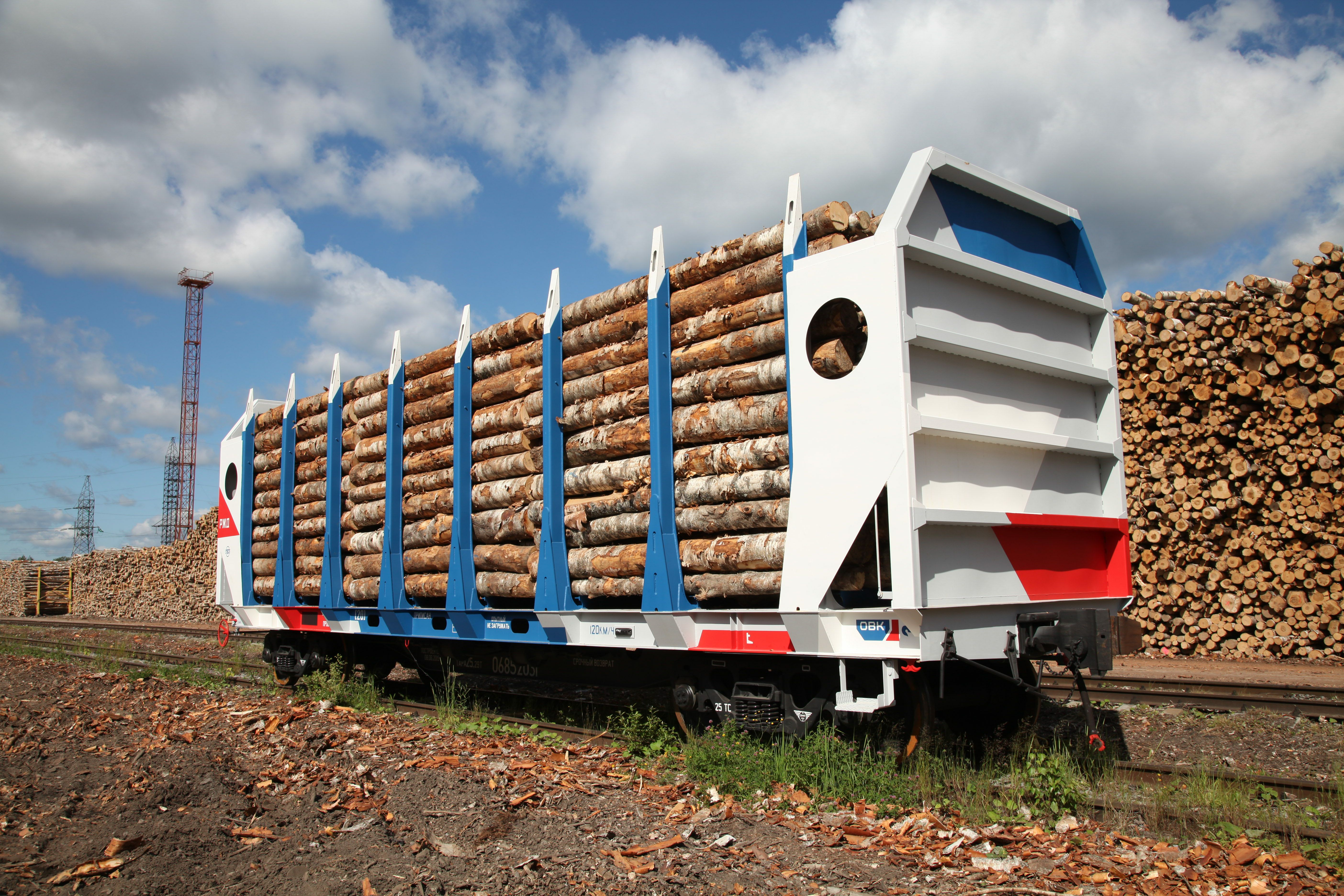 Вагон-платформа для перевозки лесоматериалов грузоподъемностью до 74 тонн с погрузочной длиной до 13 метров производства АО «ТихвинСпецМаш»